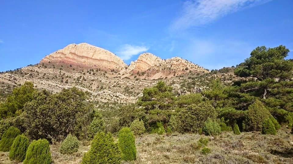 Peñagolosa This is a photography of a Special Area of Conservation in Spain with the ID: ES5223004. Natura2000 entry, EEA entry